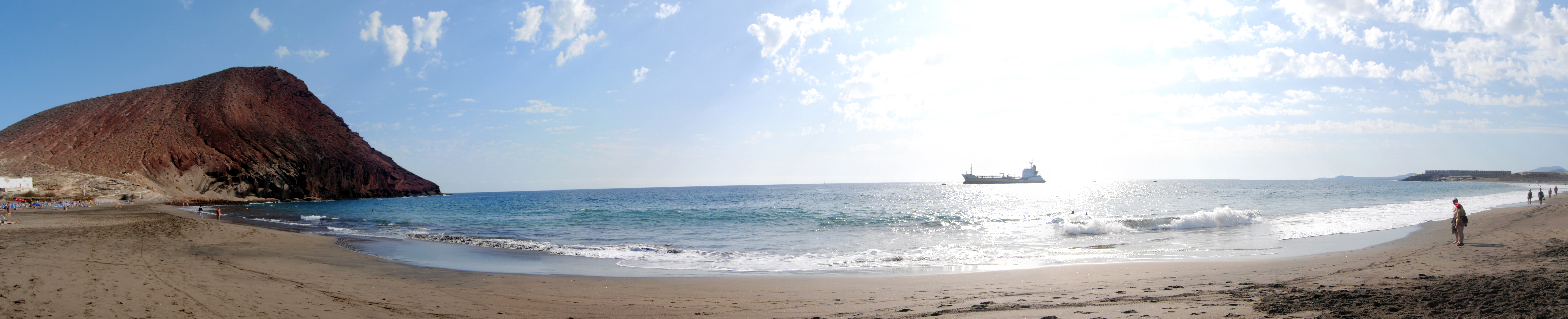 Vista de Montaña Roja y la playa de La Tejita